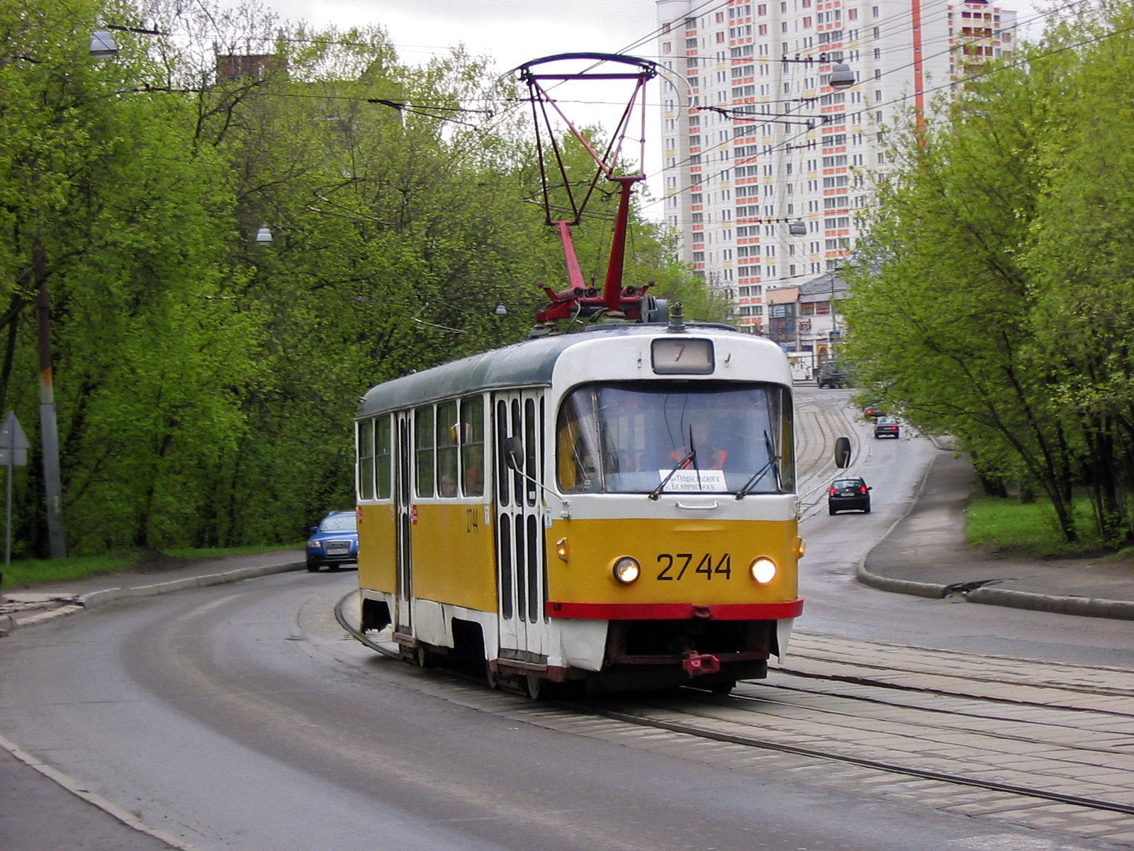 Трамвай Tatra T3 на 7-м маршруте в Москве.